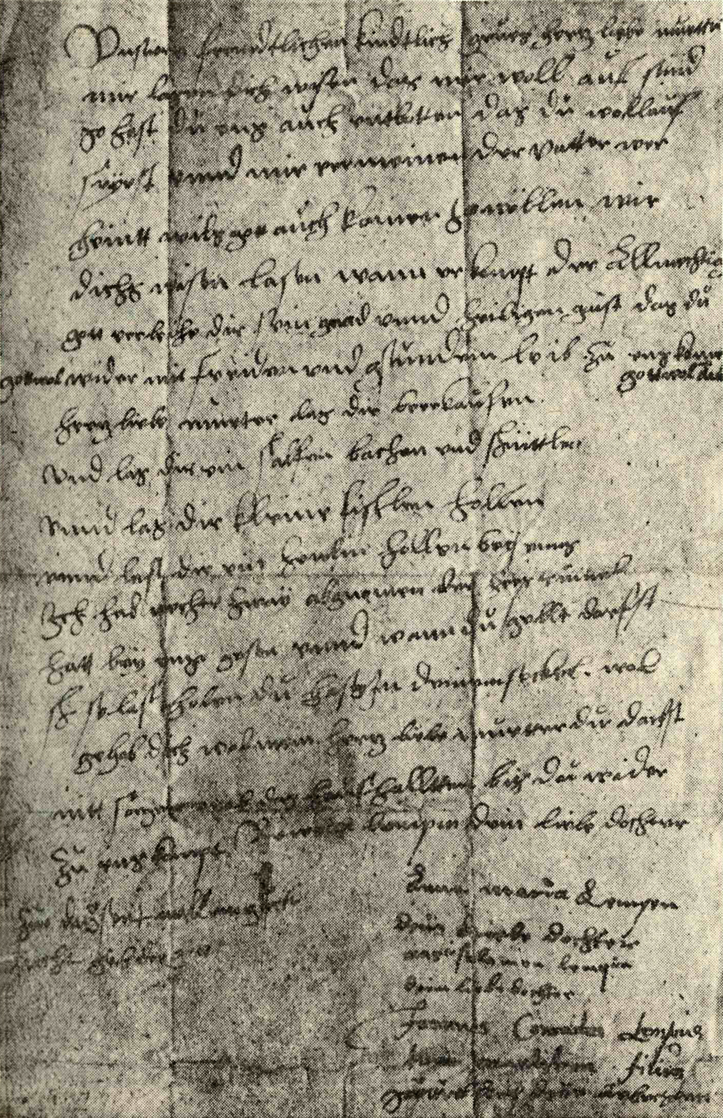 Dokument im Hexenprozess gegen Rebekka Lemp 1590 in Nördlingen. Brief der Kinder an ihre Mutter vom 2. Juni 1590, einen Tag nach ihrer Verhaftung.